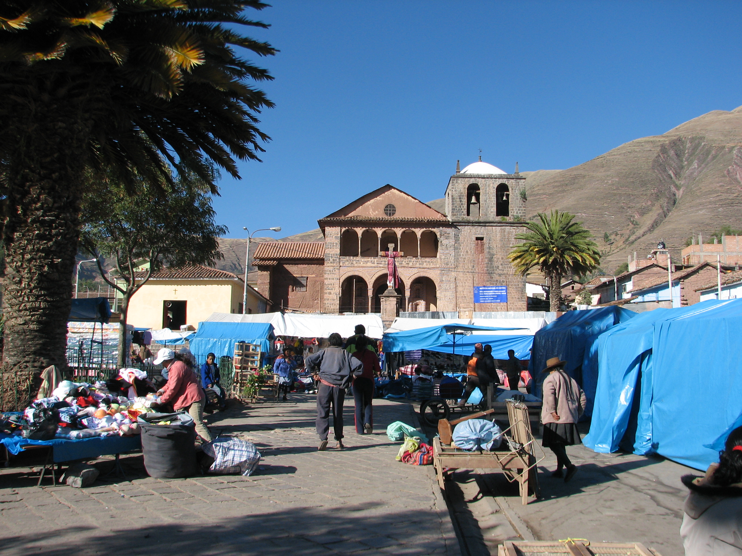 Plaza de Armas of Urcos in Urcos/Quispicanchi/Cusco, Peru.